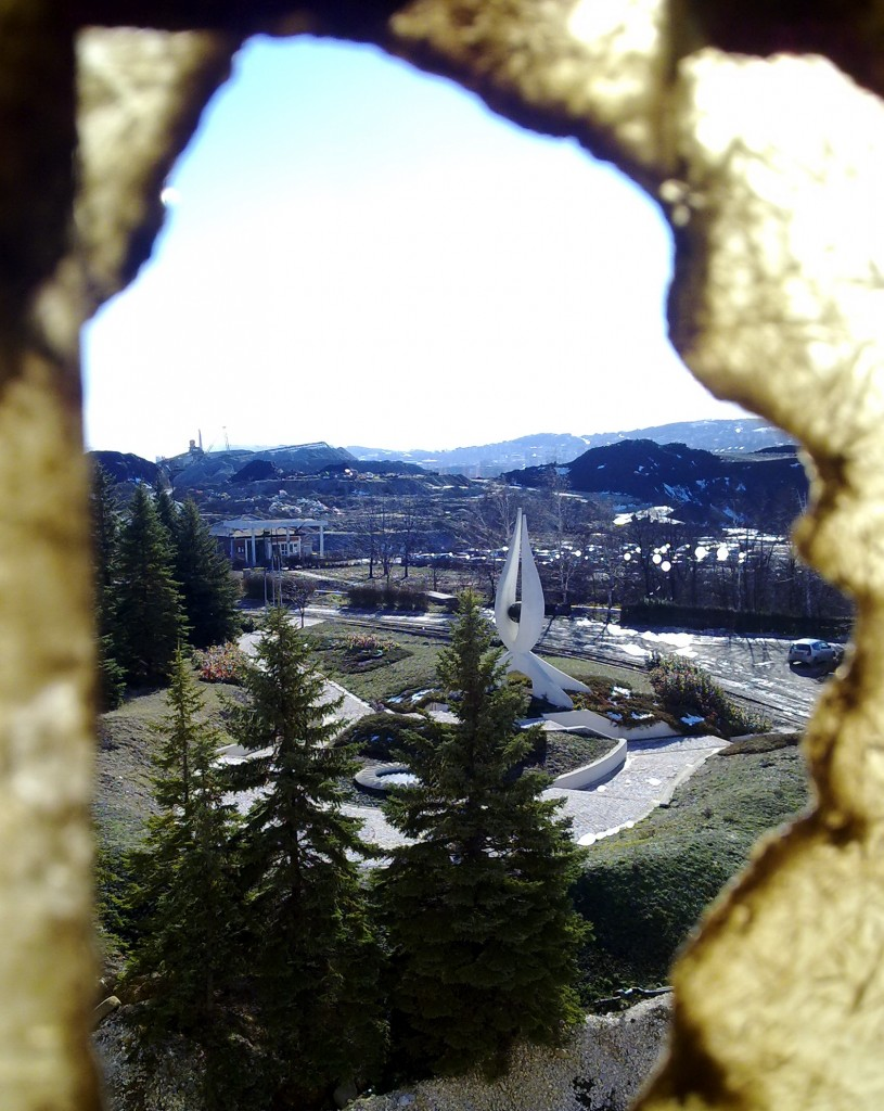 Spomenik logorašima borskog rudnika